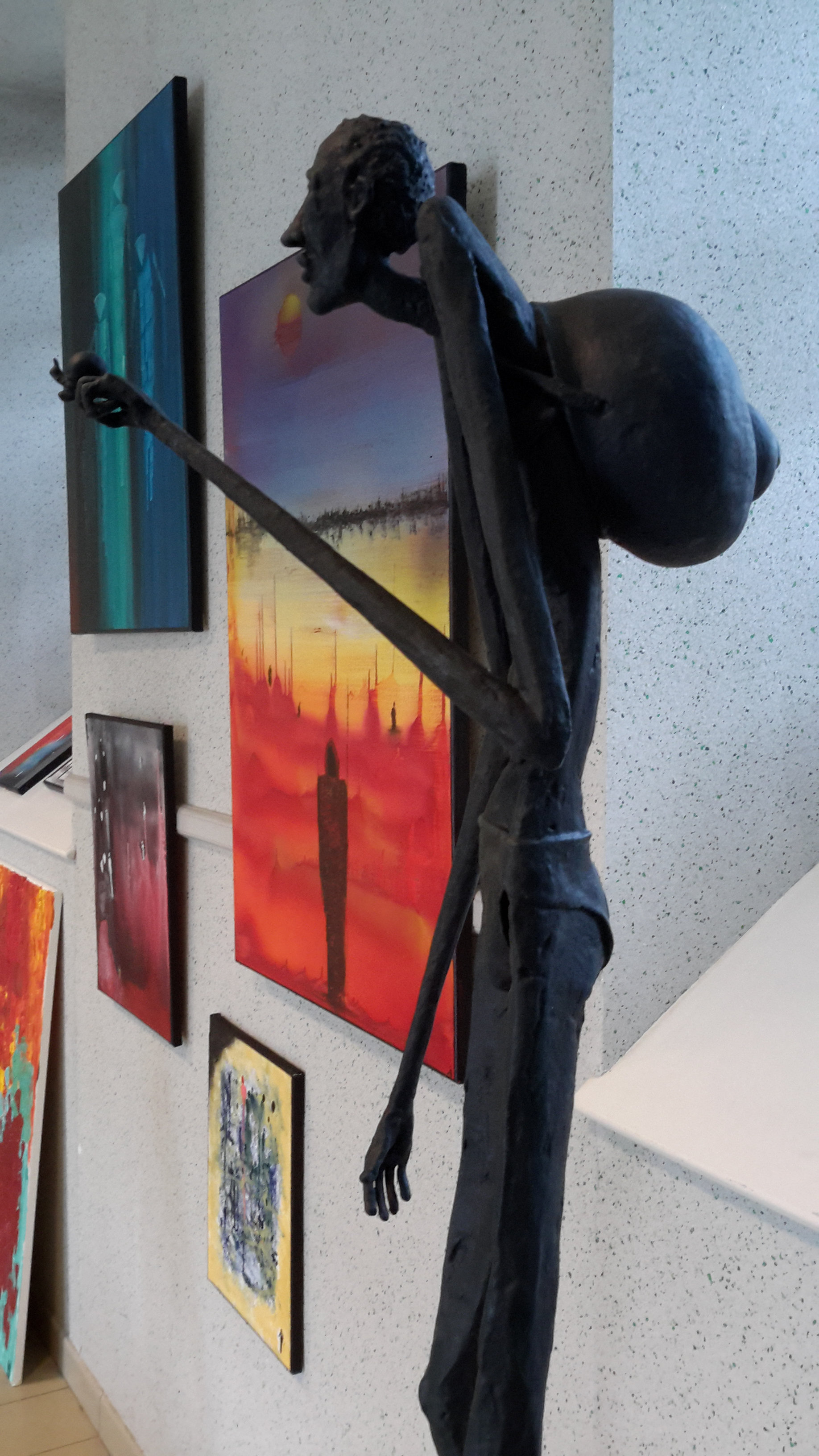 Un grand moment de partage - Avril 2019